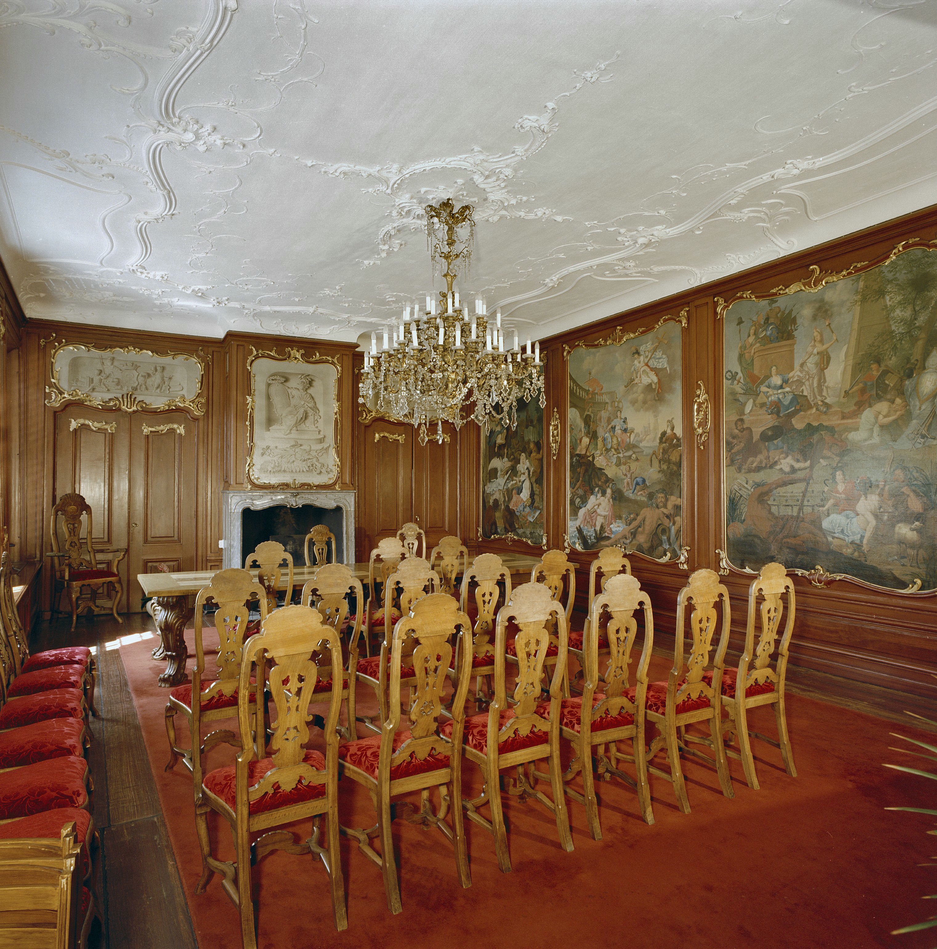 Stadhuis: Interieur raadzaal met grote geschilderde behangsels met allegorieën van Daniël Reynes, stucplafond, schouw (opmerking: Monumenten In Nederland Friesland)